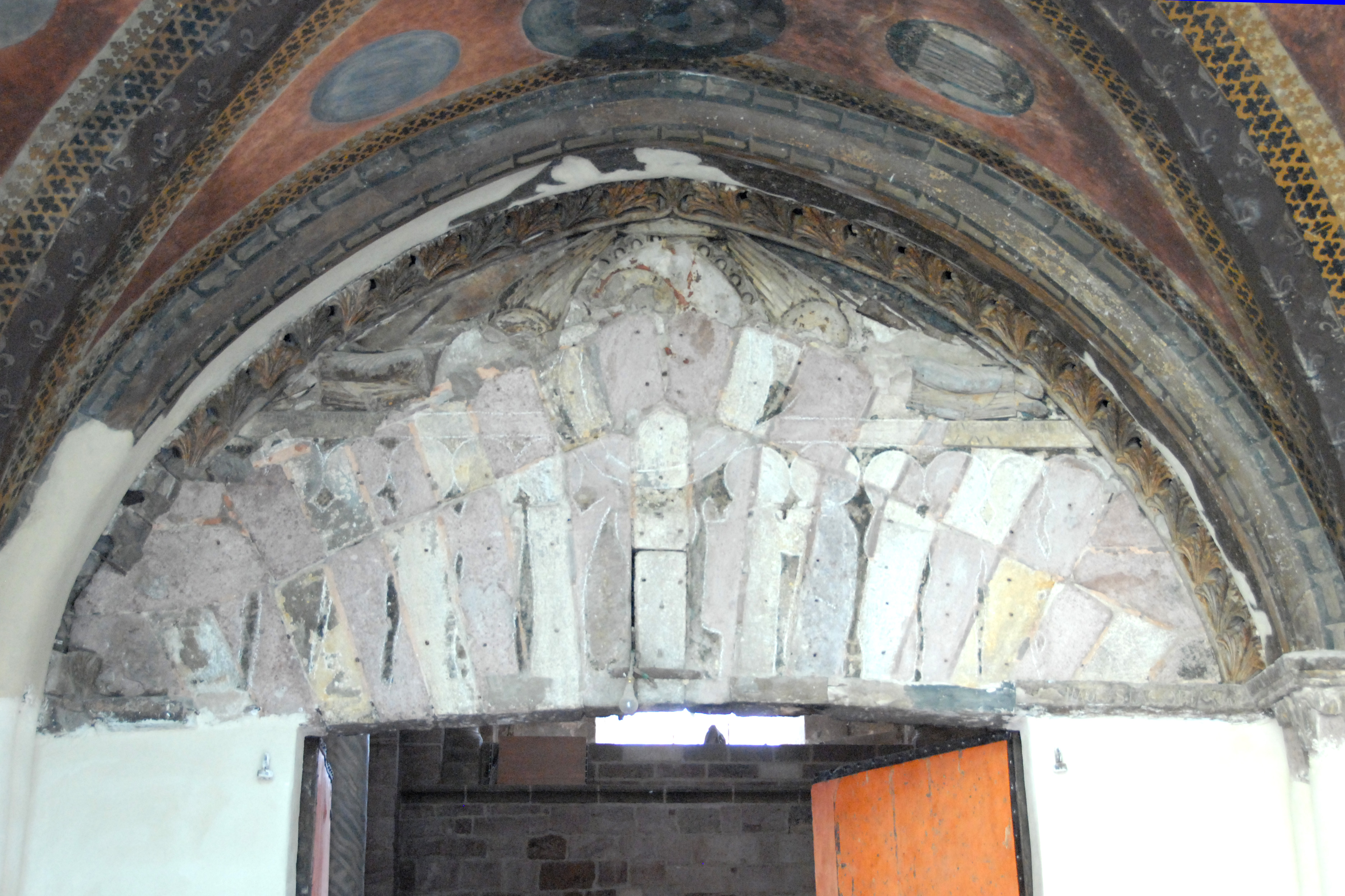 Sain-Julien Brioude, Tympanon, NW-Vorhalle